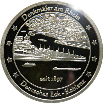 Das Deutsche Eck in Koblenz